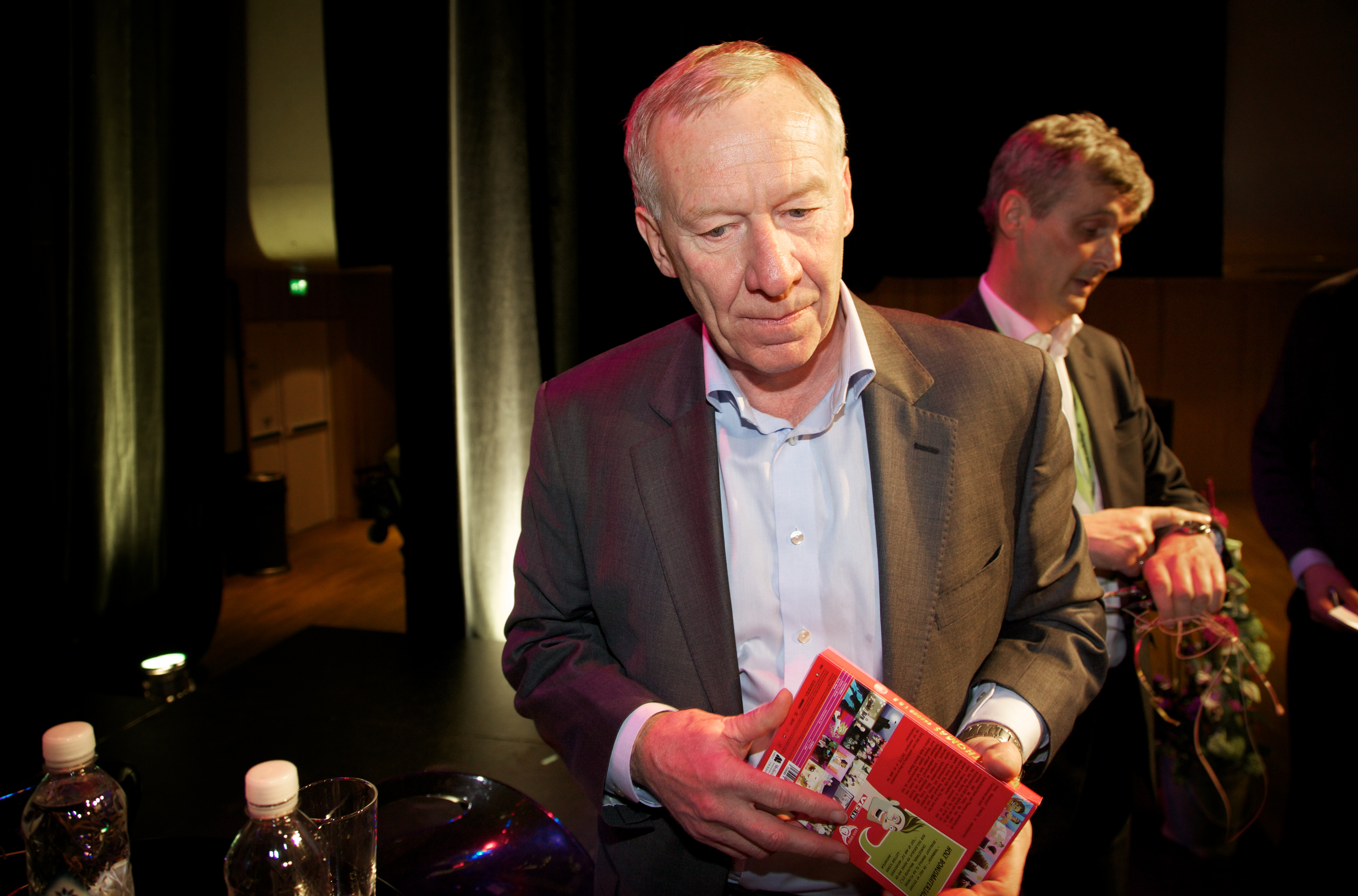 Alf Hildrum. Foto: Eirik Helland Urke